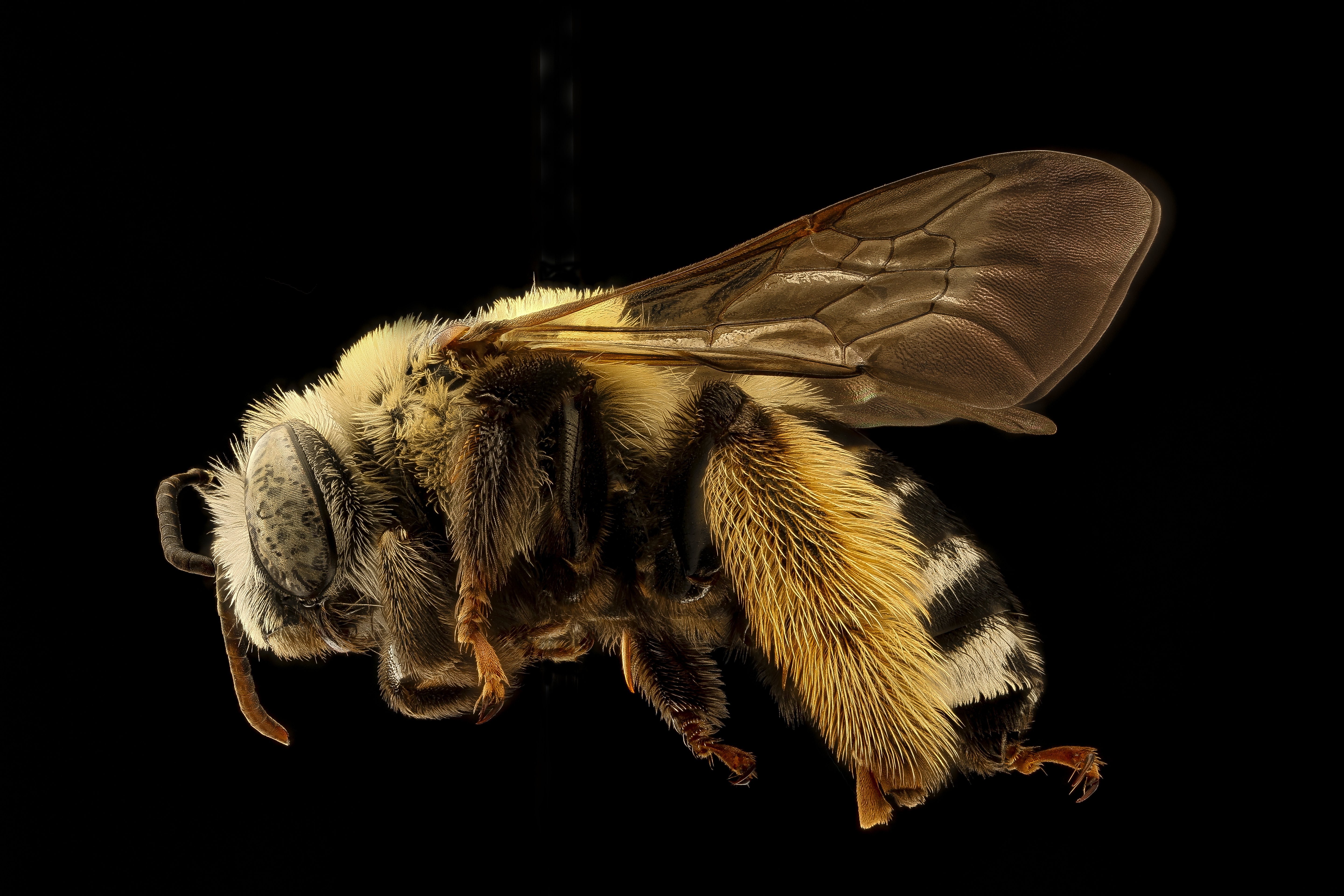 Abeja (Melissodes comptoides)